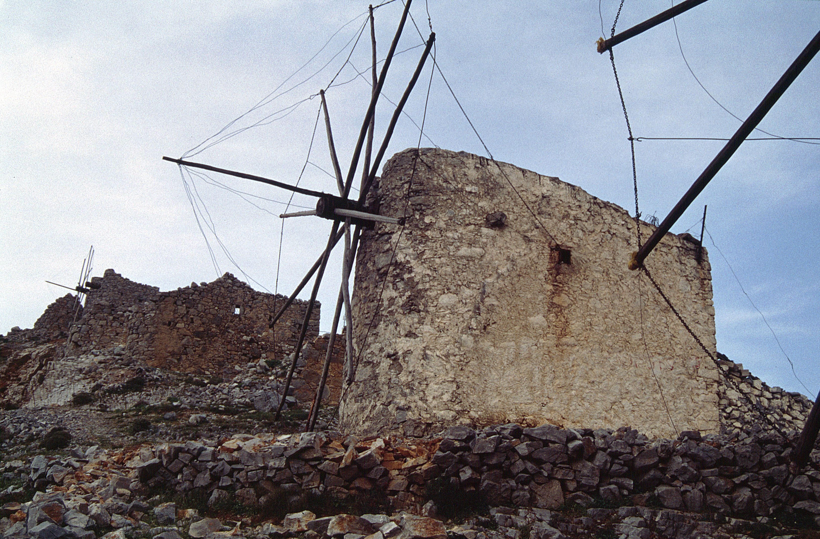 Windmühlen-Ruinen am Rand der Lasithi-Hochebene